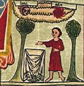 Dédié à saint Maurice, le couvent des bénédictines d'Ebstorf se trouve en Allemagne, à 25 km au sud de Lunebourg. C'est en 1830 qu'une des religieuses, Charlotte von Lasperg, retrouvait la mappemonde, roulée et couverte de poussière, sur une étagère d'un débarras humide et sans fenêtre où étaient entreposés des objets liturgiques au rebut. Peinte sur trente peaux de chèvres cousues ensemble, cette grande mappemonde circulaire de 3,58 x 3,56 mètres de diamètre devait d'abord être déployée dans le chœur du cloître des moniales, avant d'être envoyée à Hanovre vers 1833-1834, puis à Berlin, en 1888, pour y être restaurée. Les trente parties, démontées pour les besoins de la restauration, furent ensuite conservées dans les tiroirs des Archives de l'État à Hanovre, où elles devaient être détruites lors d'un bombardement en 1943. Mais avant sa disparition, deux fac-similés avaient été réalisés à partir de l'original, l'un par Ernst Sommerbrodt, à Hanovre, en 1891, un autre par Konrad Miller, à Stuttgart, en 1896. La Bibliothèque nationale de France en possède actuellement deux reproductions. De son côté, l'université de Lunebourg, où est conservé un fac-similé aux dimensions réelles, a réalisé sur Internet un programme qui permet d'accéder facilement aux images et aux légendes de la mappemonde. La datation de la mappemonde demeure incertaine, comprise entre 1213 et 1373. Dans les années 1930, Richard Ühden avançait la date de 1235 et en attribuait la paternité à Gervais, prévôt du monastère d'Ebstorf entre 1223 et 1234 et assimilé à Gervais de Tilbury. Ici l'Arbre Oraculaire (Arbre Sec, Arbre Sol) est représenté avec les symboles du Soleil et de la Lune.